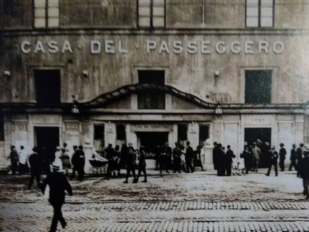 Casa del passeggero probabilmente negli anni 1920.